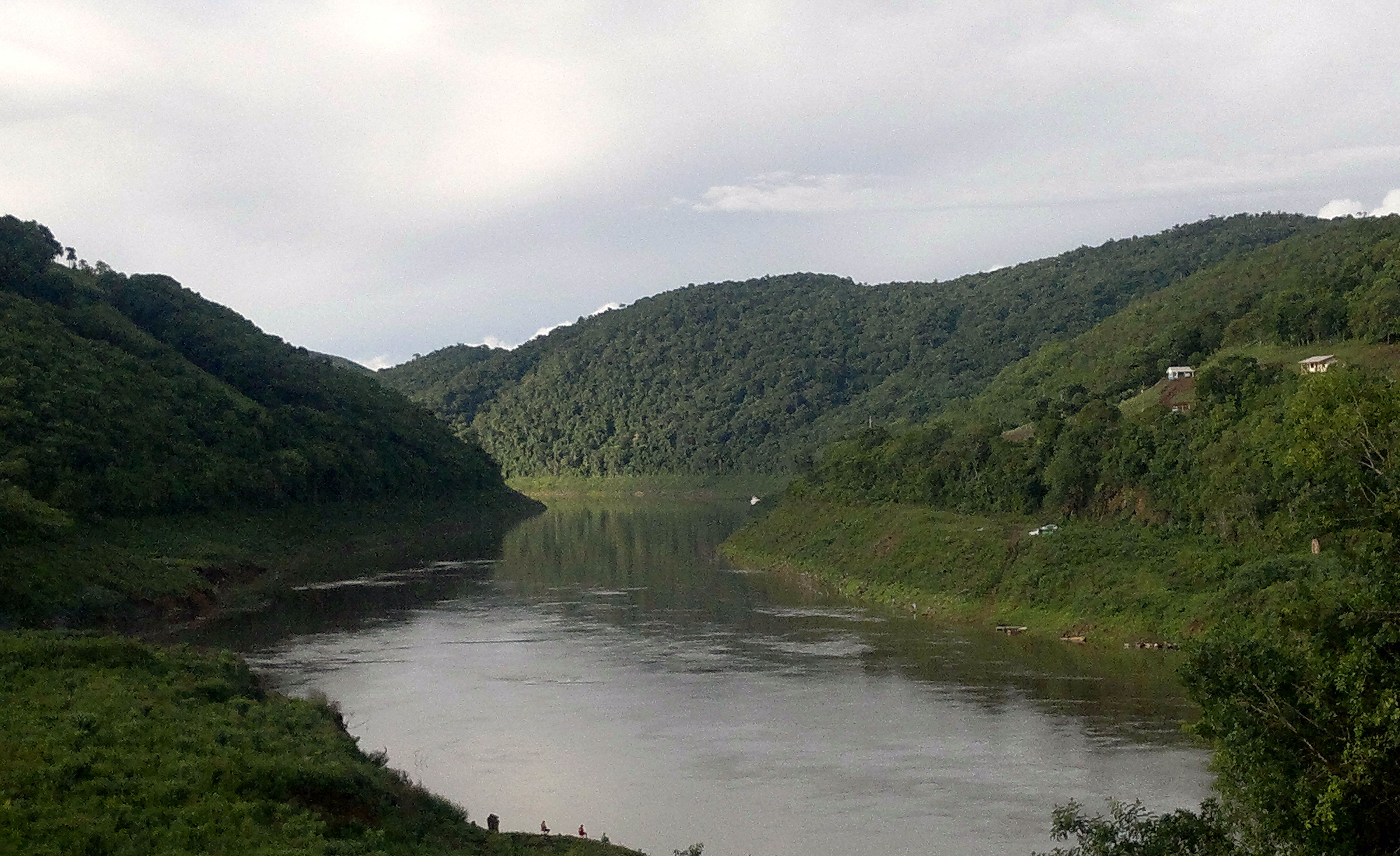 Rio Pelotas